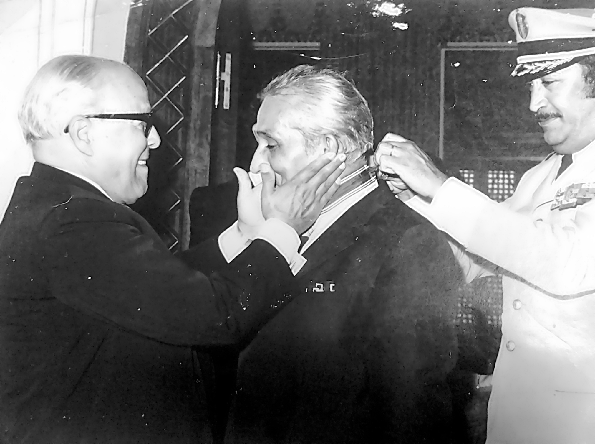 Habib Osman est décoré et félicité par le président tunisien Habib Bourguiba. De gauche à droite : Habib Bourguiba (Président), Habib Osman (Photographe et militant tunisien) et Mimoun Belkhodja (Chef de Camp du palais présidentiel)